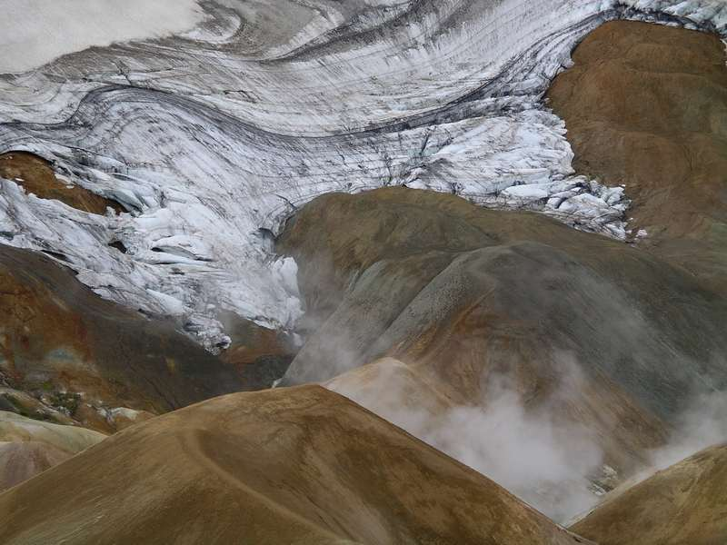 Kerlingarfjoll